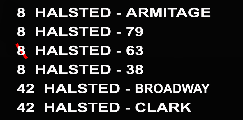 Zelfgemaakte media in Photoshop CS